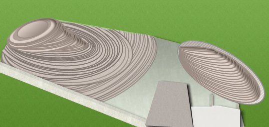 אני יצרתי איור עבור היכל הזיכרון הלאומי